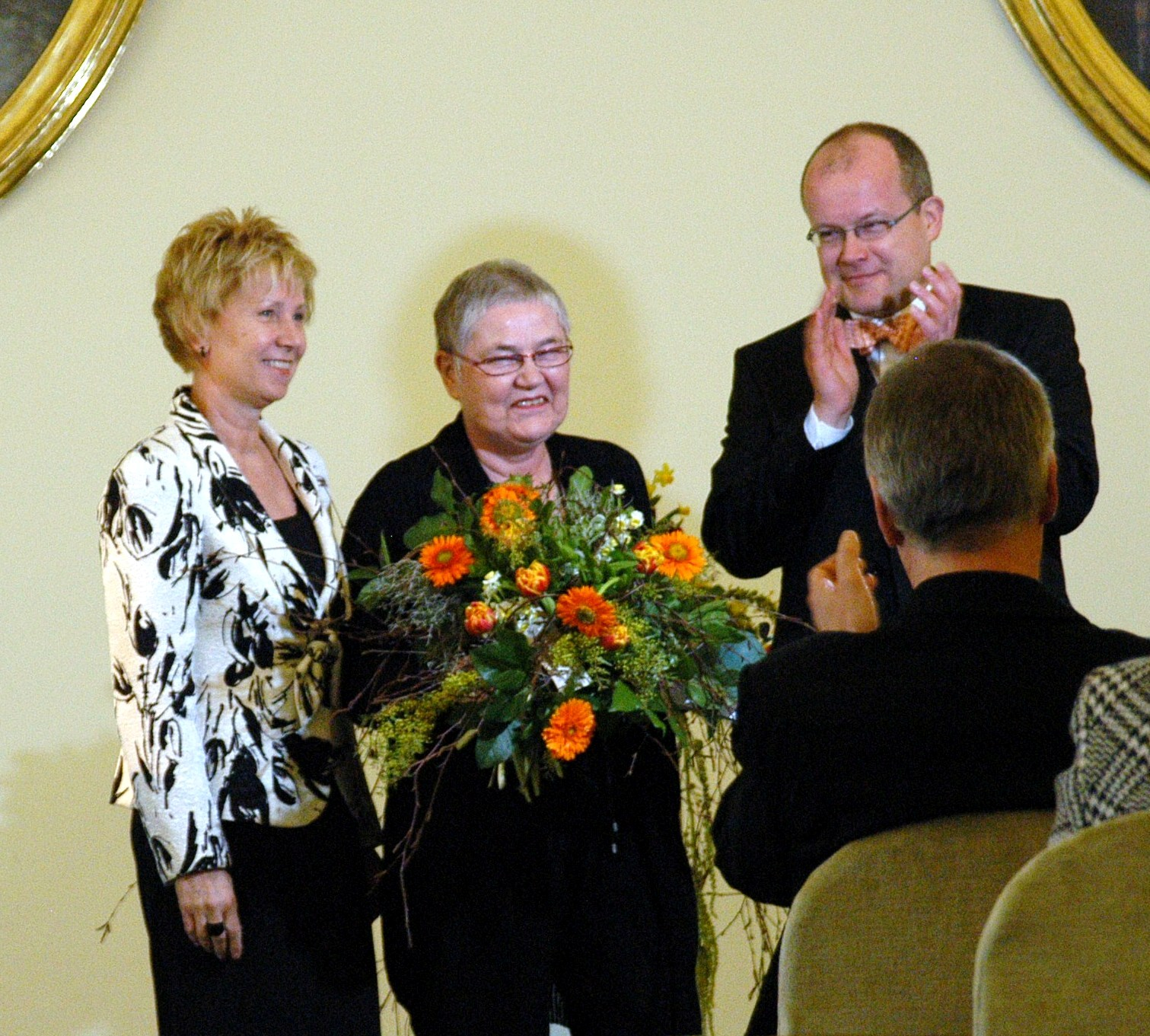 Oberbürgermeisterin Helma Orosz mit der Dresdner Kunstpreisträgerin Prof. Elke Hopfe und dem Kulturbürgermeister Ralph Lunau, v. L. n.R